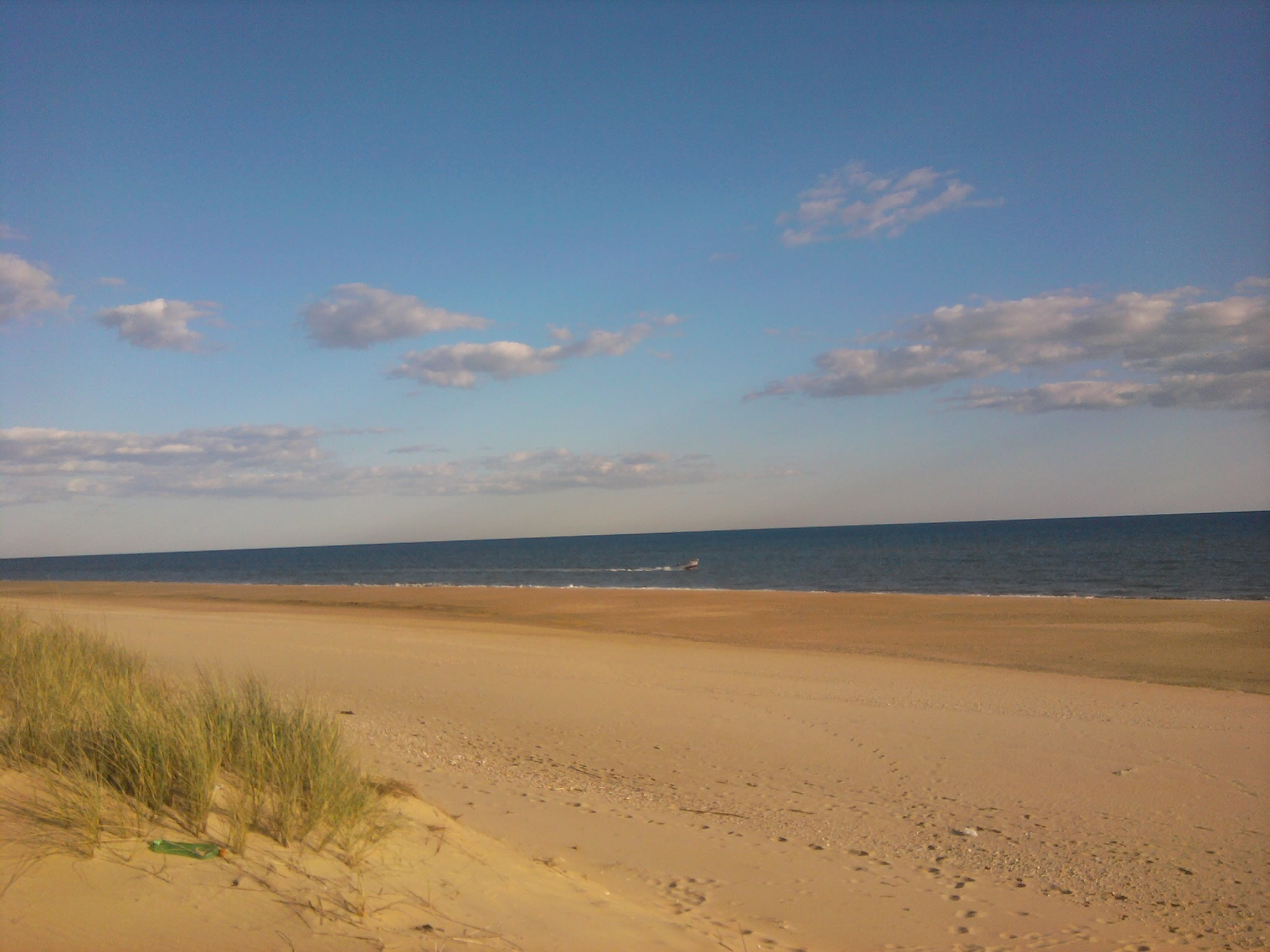 Vista de la Playa de Nueva Umbría, en el Paraje Natural Marismas del Río Piedras y Flecha del Rompido.